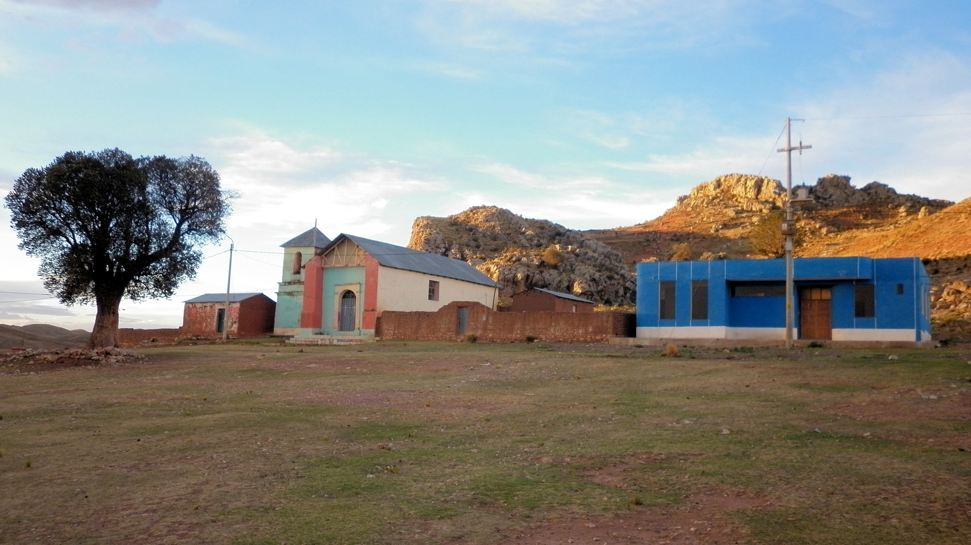 Urcubinuni Central (Urcunimuni).